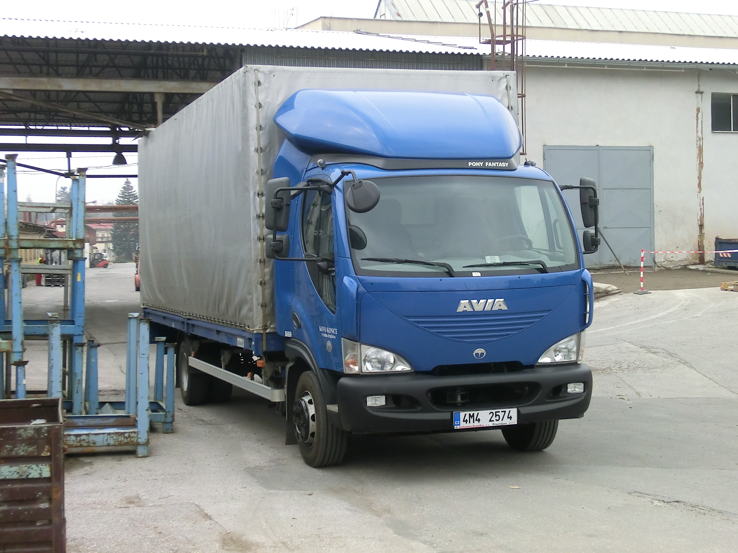 Dálkový valník Avia D120-210 ve Vrchlabí.